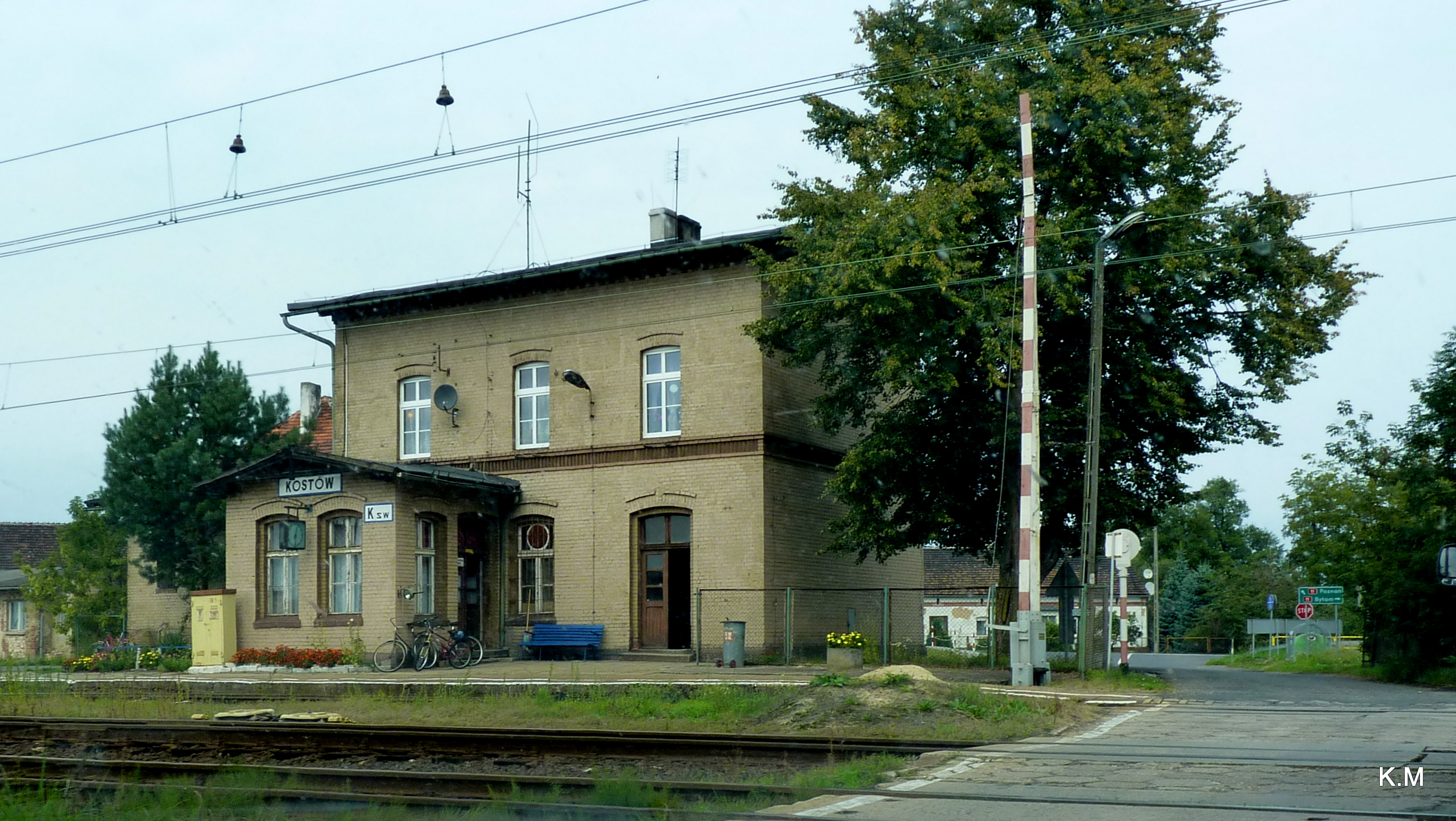 Kostów - stacja kolejowa